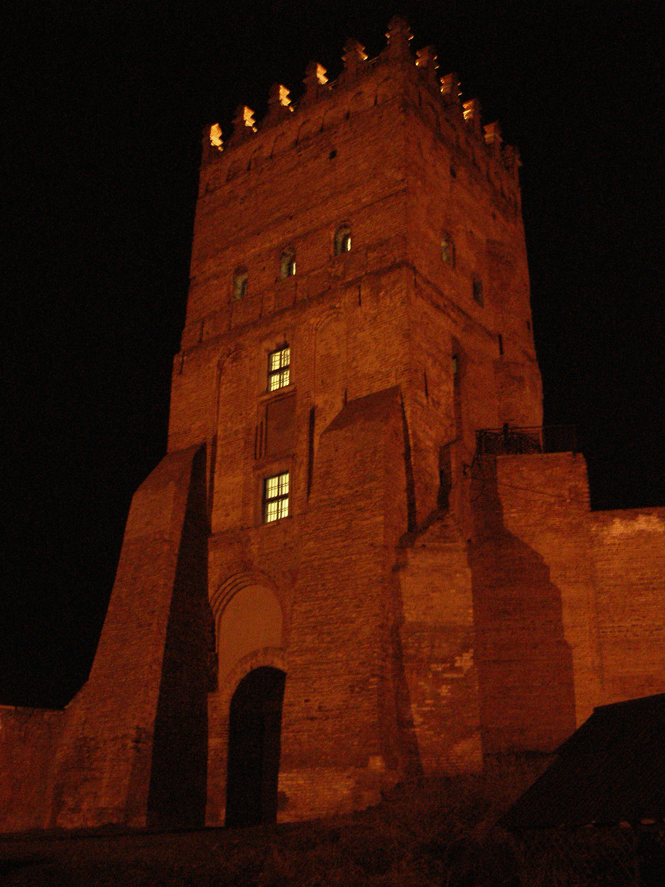 В'їзна (Надбрамна) башта (мур.), Луцьк, вул. Кафедральна, 1а